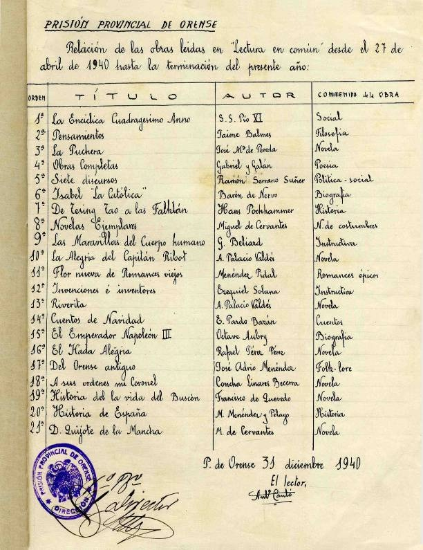 “Relación de las obras leídas en «Lectura en común» desde el día 27 de abril hasta la terminación del presenta año”. Prisión Provincial de Ourense, caja 12917.